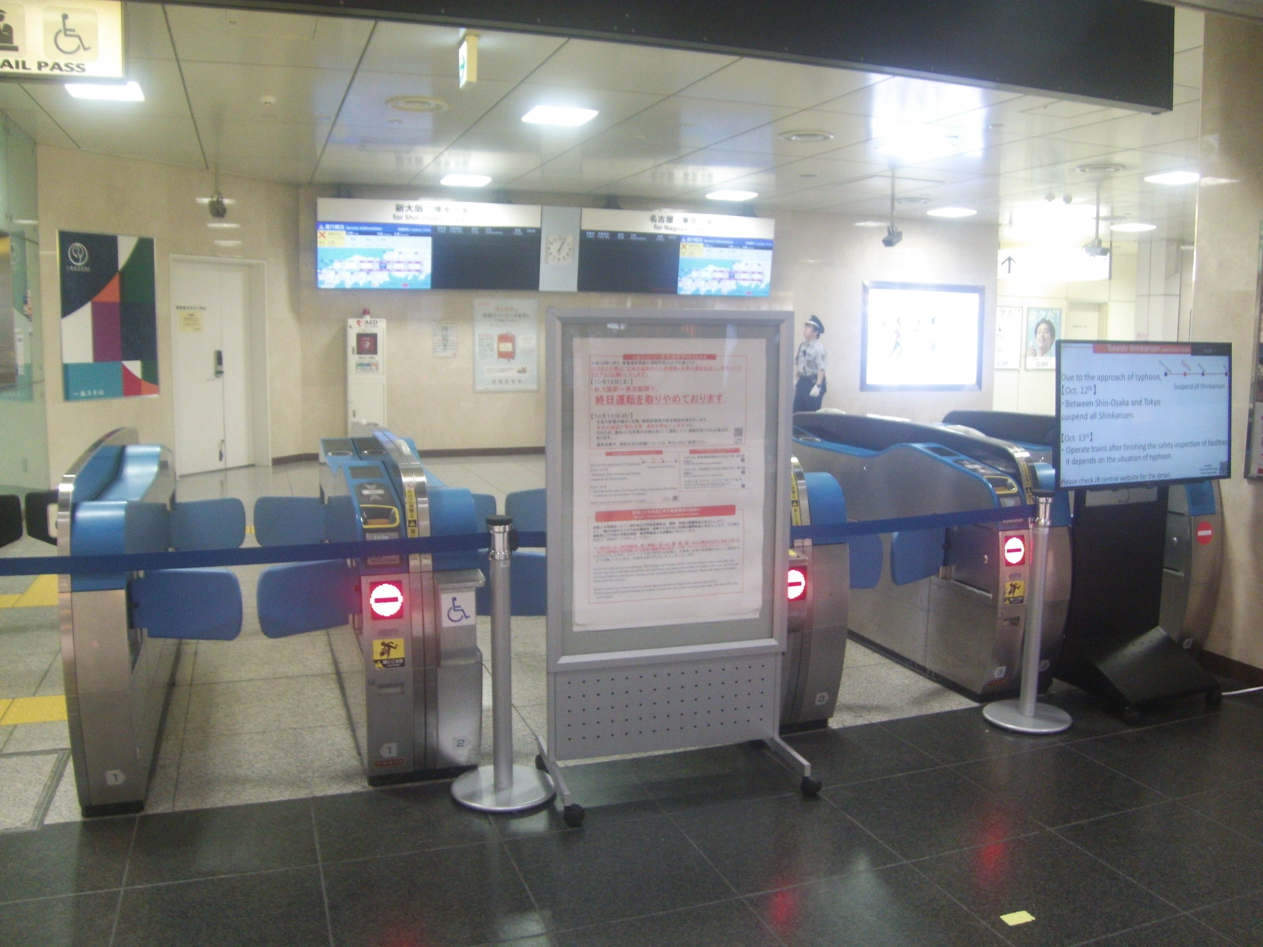 令和元年10月12日に日本列島を襲った台風19号による東海道新幹線の計画運休告知と改札閉鎖状況